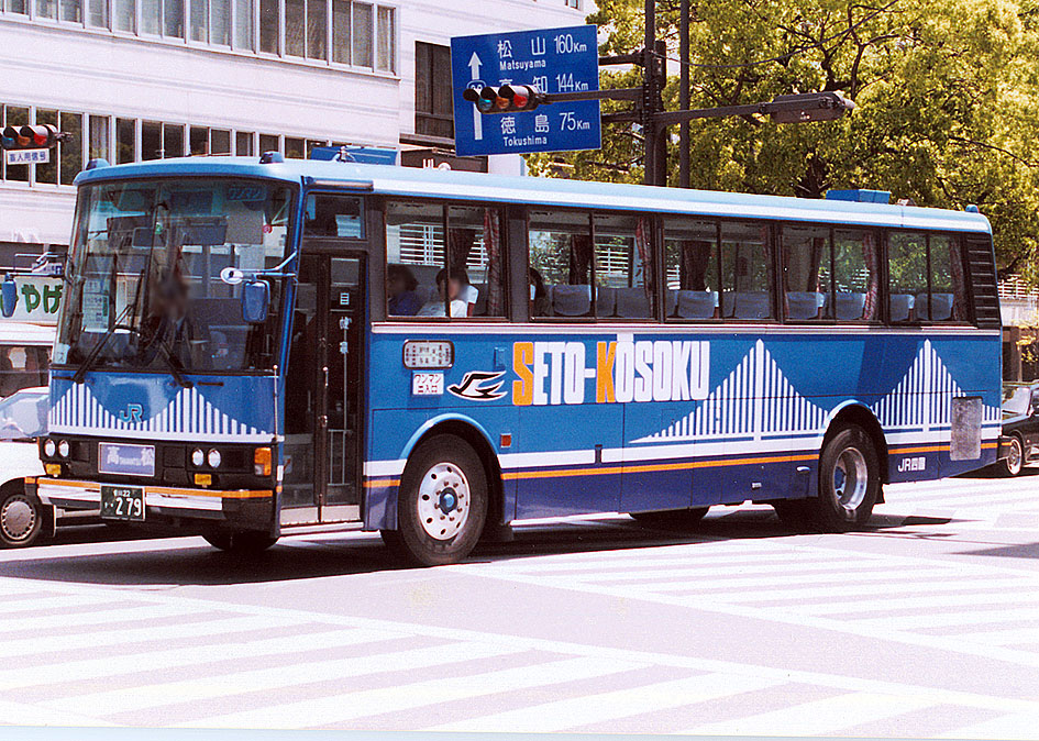 四国旅客鉄道 瀬戸大橋特急線 専用車両 641-6929